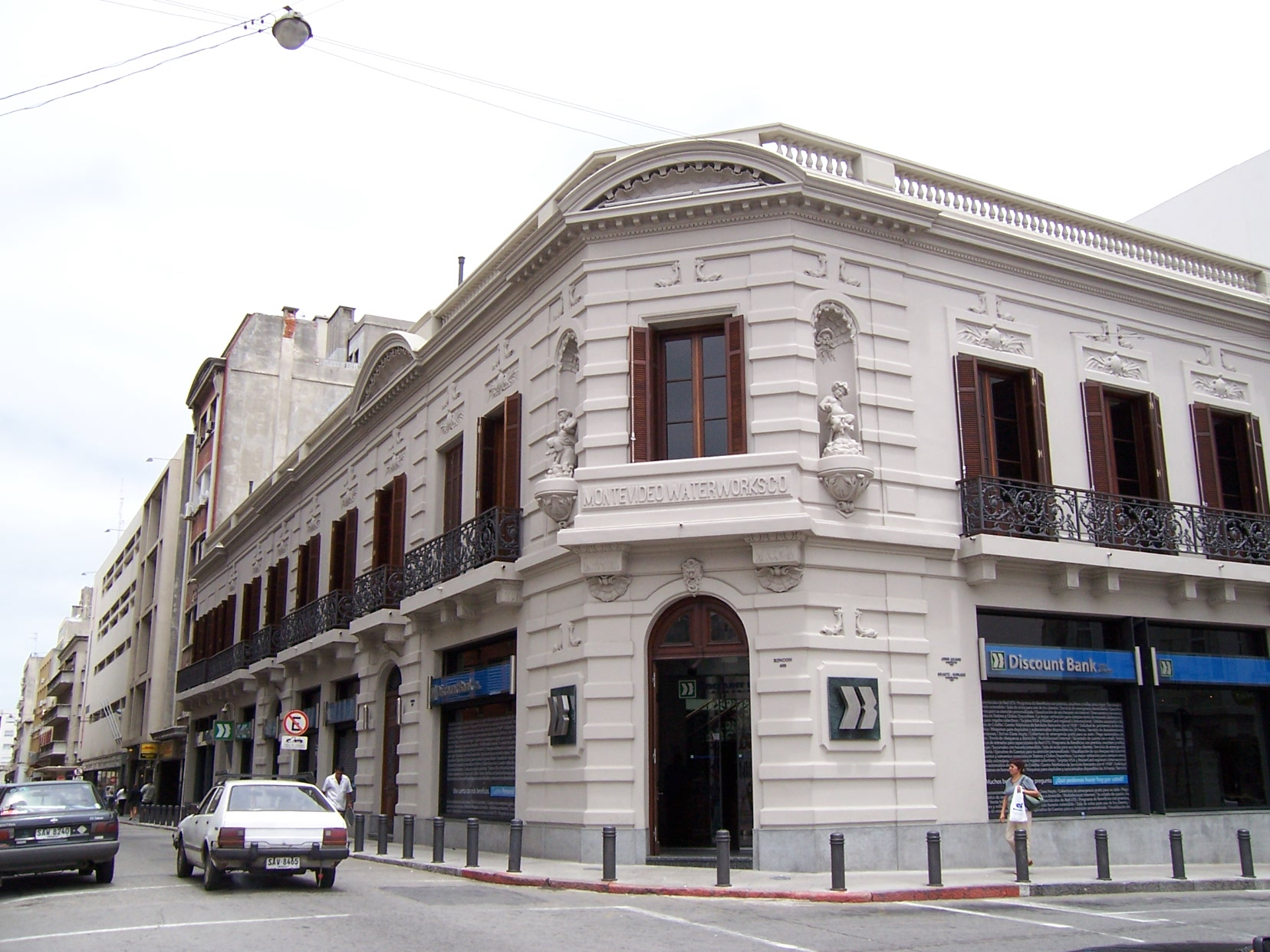 Antigua Compañía de Aguas Corrientes - Montevideo Waterworks Co.. Ubicada en el departamento de Montevideo